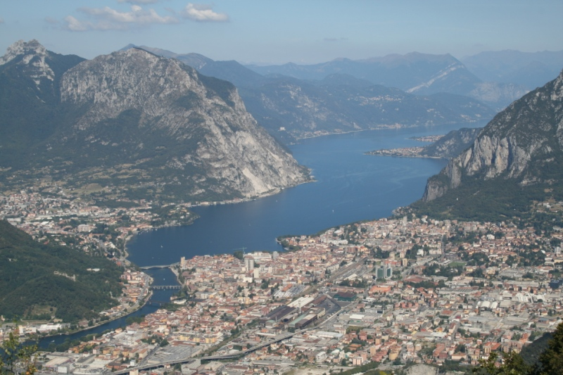 Lago di Como en Lecco. Malgrate a sinistra, la piu grande Lecco a destra.